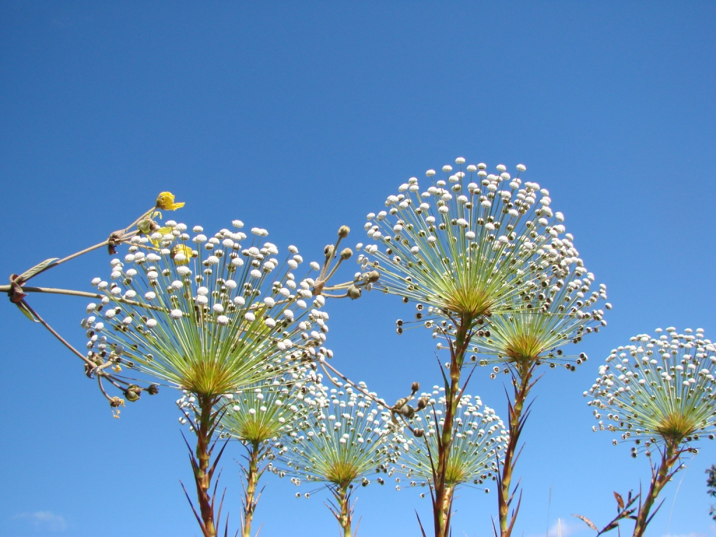 Paepalanthus speciosus - ERIOCAULACEAE - Jardim Bot�nico de Bras�lia - DF - Brasil